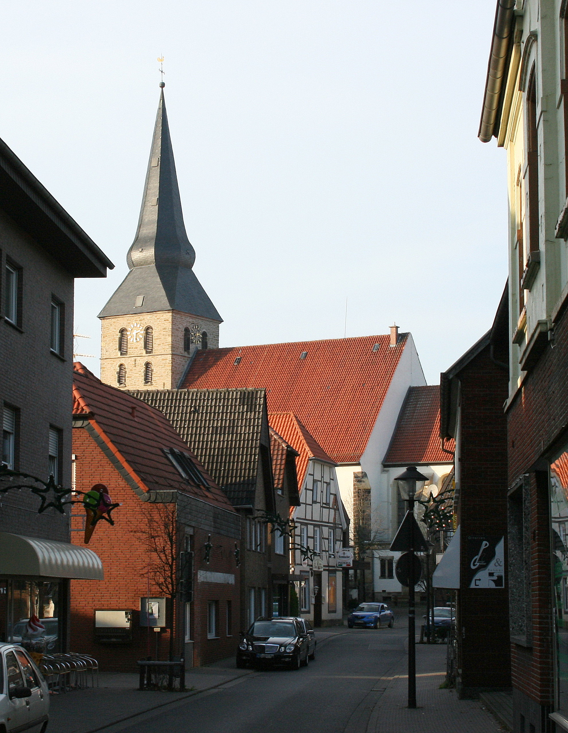 Pfarrkirche St. Benedikt in Ascheberg-Herbern